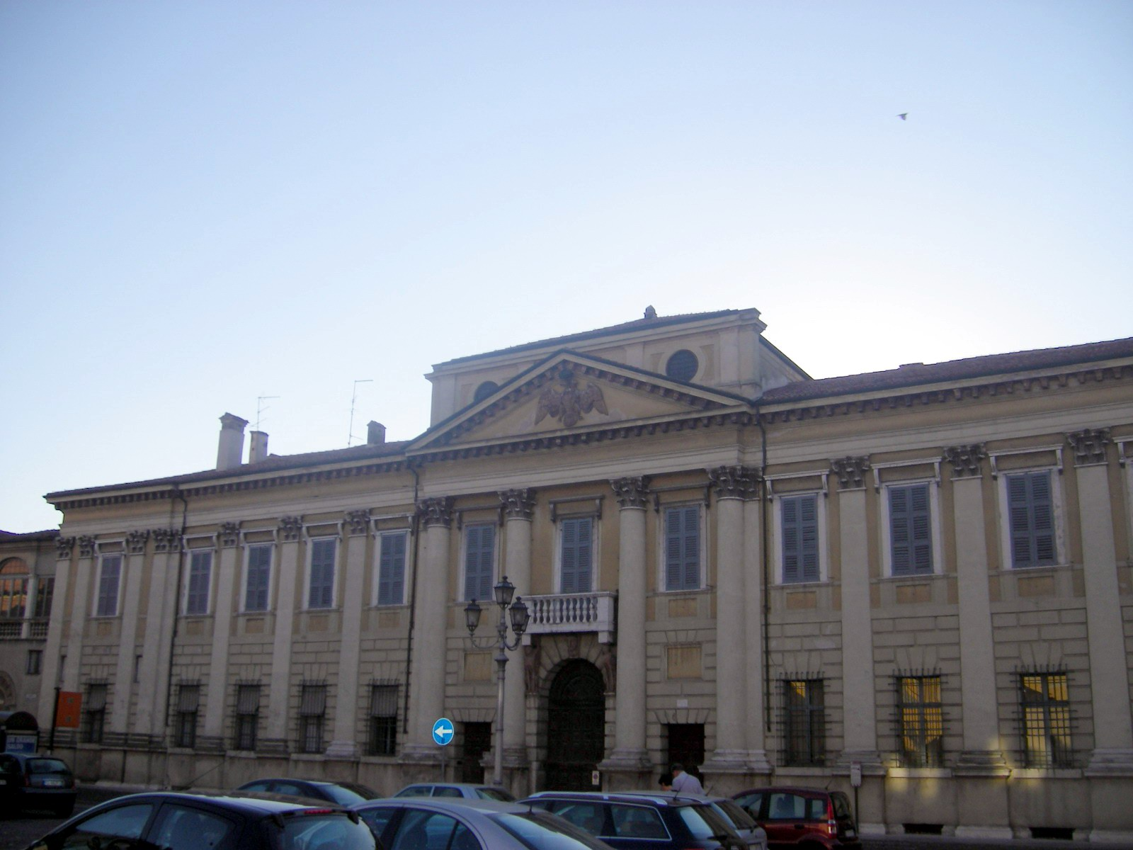 Palazzo d'Arco a Mantova